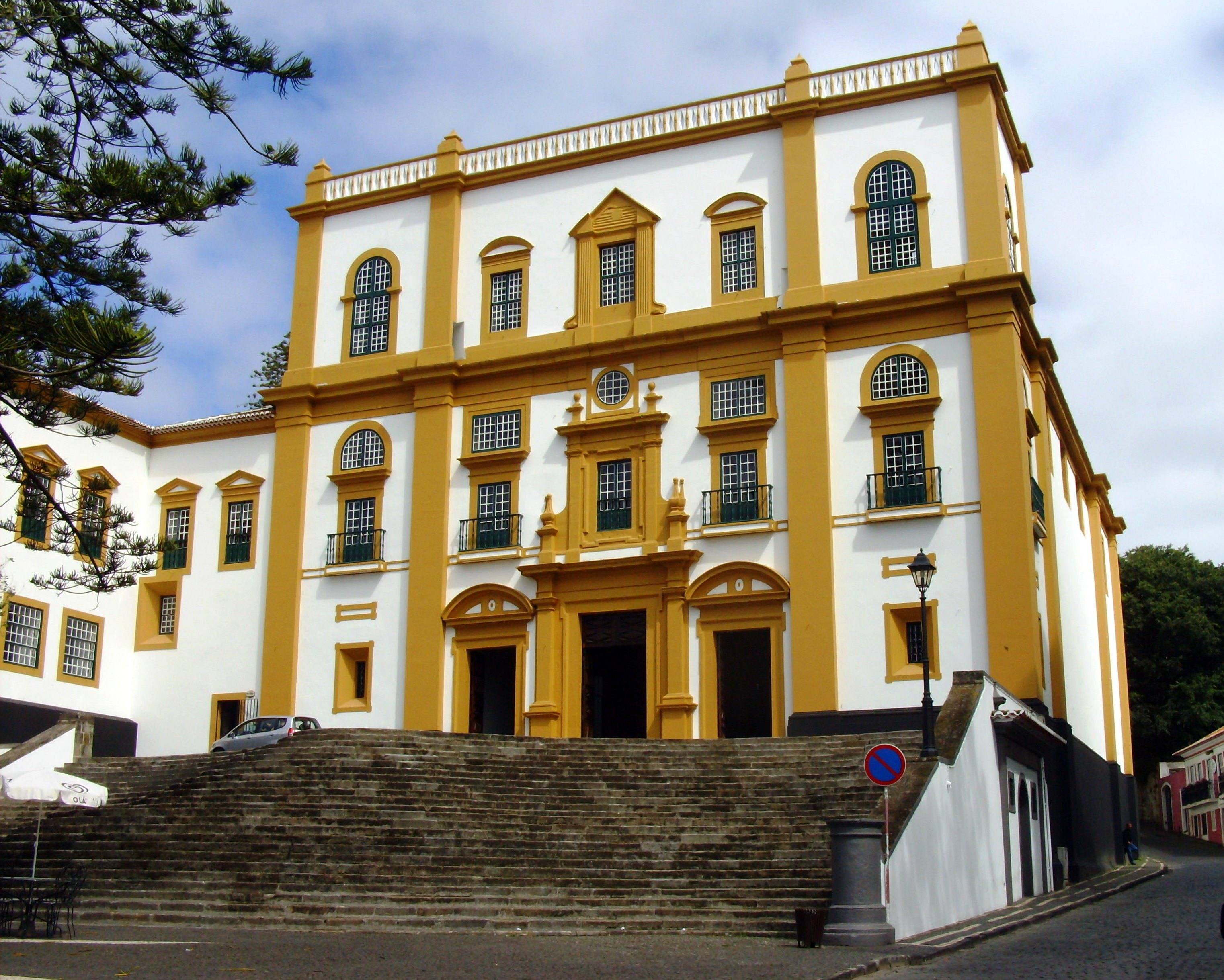 Igreja de Nossa Senhora do Carmo (Igreja do Colégio de Angra), Angra do Heroísmo, Ilha Terceira, Açores: fachada.